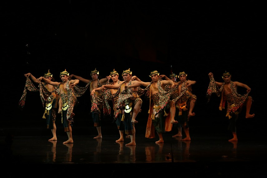 “Kidung Dandaka” berkisah tentang Rama dan Sinta yang harus menjalani pembuangan di hutan selama 13 tahun, semua berawal dari kemenangan Rama dalam sayembara Mantili yang membawanya pada kesengsaraan. Cobaan dan penderitaan terus datang pada Rama sampai ia harus berpisah dengan Sinta.